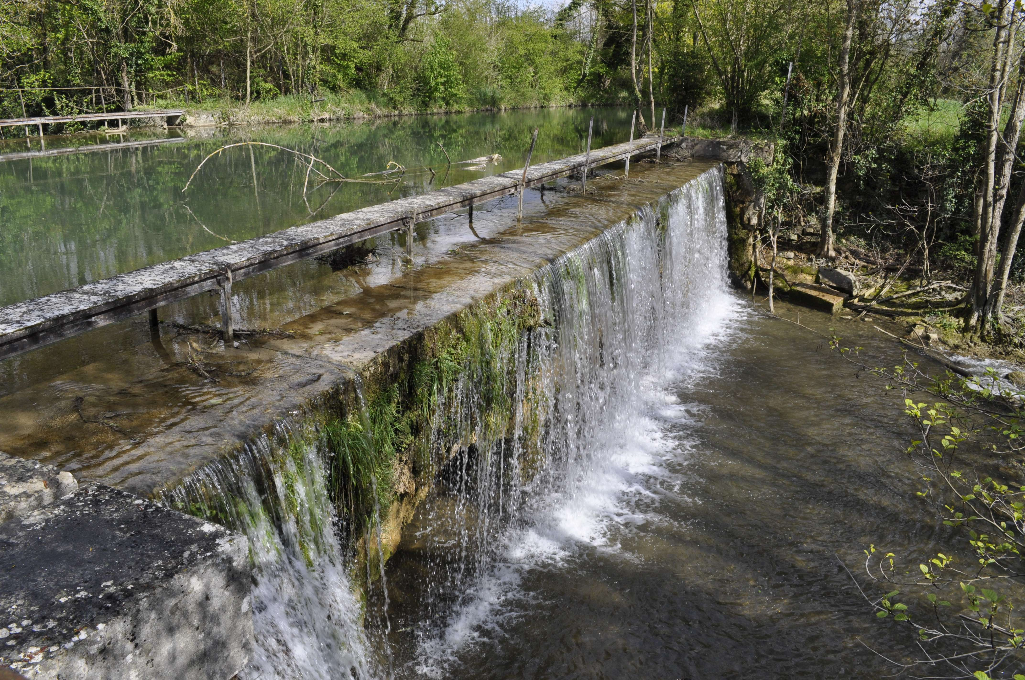 Barrage sur la Bèze à Drambon, aux confluences avec l'Alban (Côte d'Or).